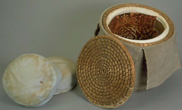 Lieu : Rennes Date d’exécution : 1940-1944 De fabrication familiale, cette marmite norvégienne est faite d'un récipient en osier doublé à l'intérieur de différents morceaux de moquette et de tissus; deux coussins pouvaient se glisser à l'intérieur pour renforcer l'isolation thermique au-dessus de l'ustensile de cuisine dans lequel se faisait la cuisson. Le couvercle en osier est doublé sur la face interne d'un morceau de moquette. Le tout est habillé d'un 'sac' en moquette dont les quatre pans se rabattent sur le couvercle.